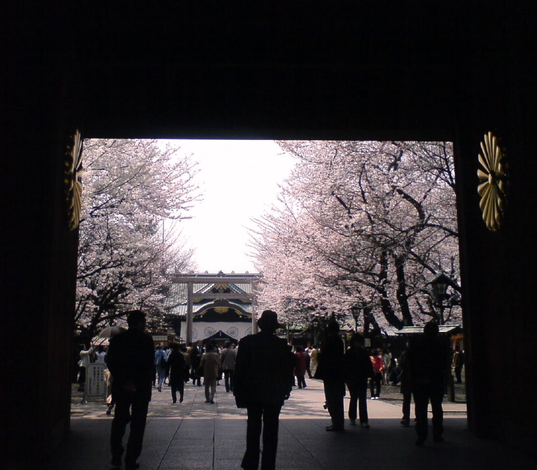 桜が咲き誇る靖国神社の境内。